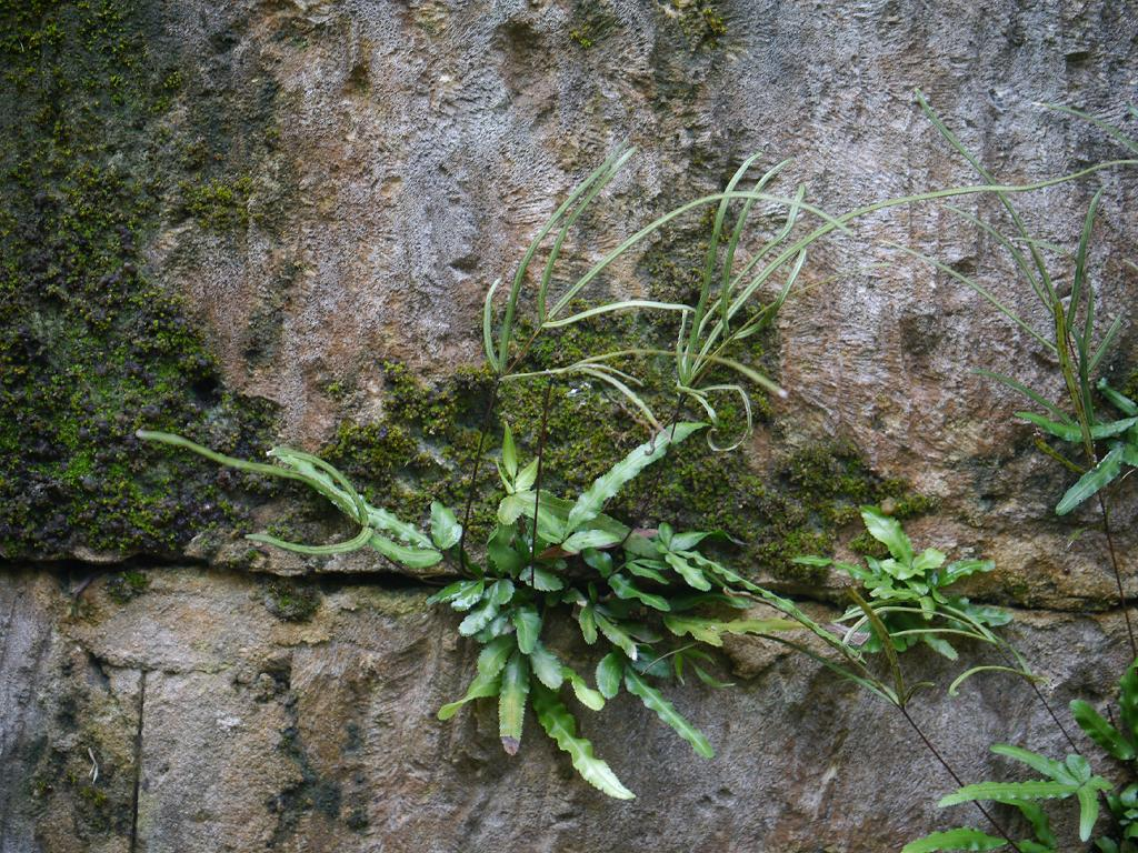 Pteris ryukyuensis：リュウキュウイノモトソウ 2015/08/27 沖縄本島：Okinawa Island, Japan